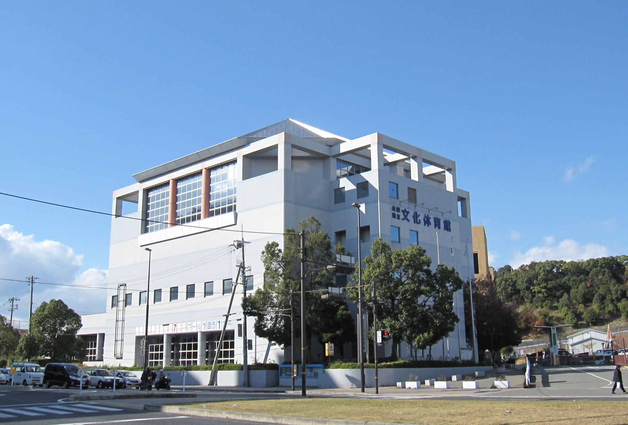 兵庫県立文化体育館